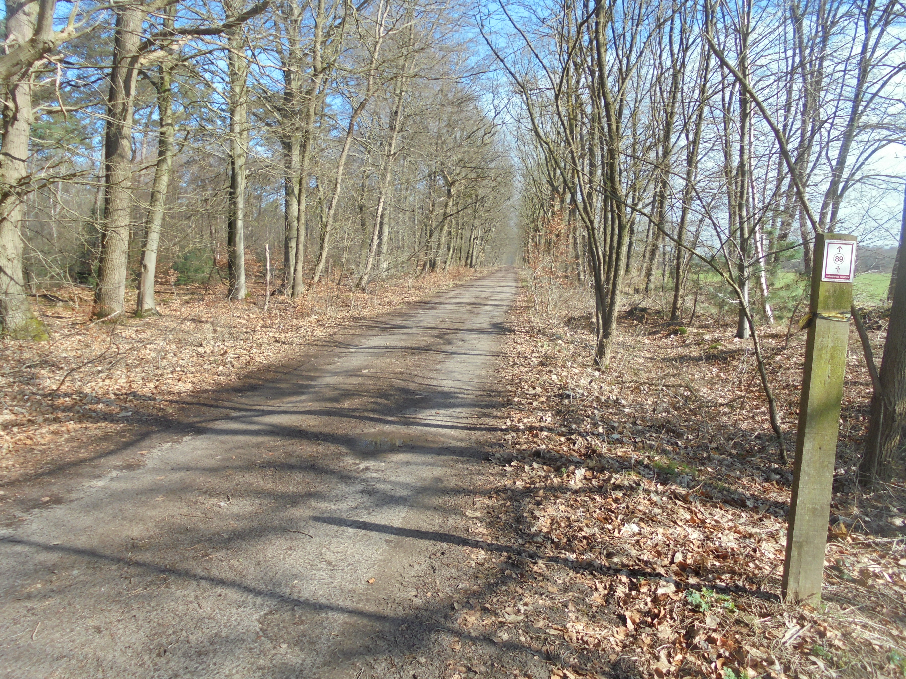 Gewestbos Ravels - Kempen - provincie Antwerpen - België